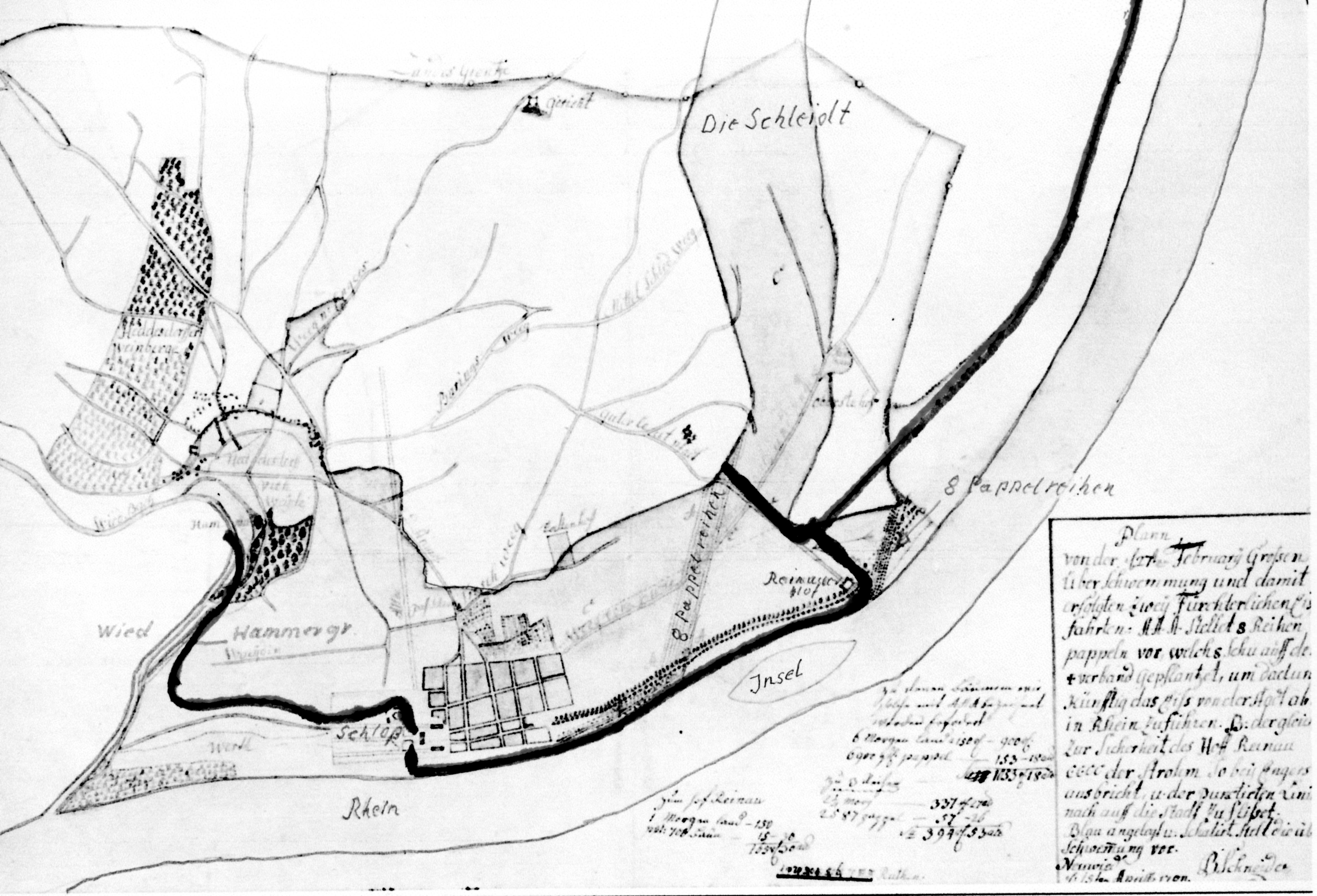 Neuwied Alter Rheinarm Schleidt